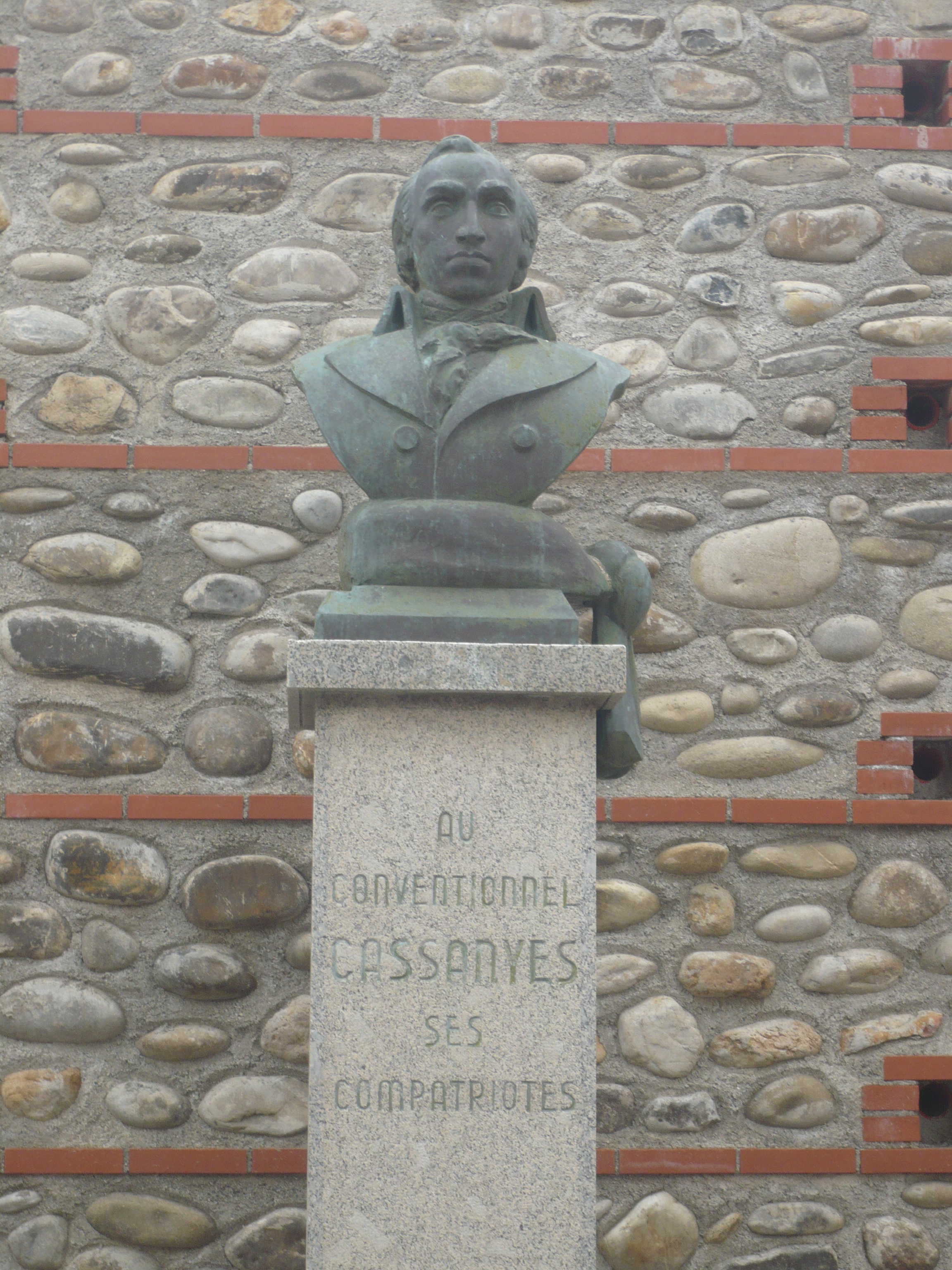 Buste de Joseph Cassanyes à Canet-en-Roussillon